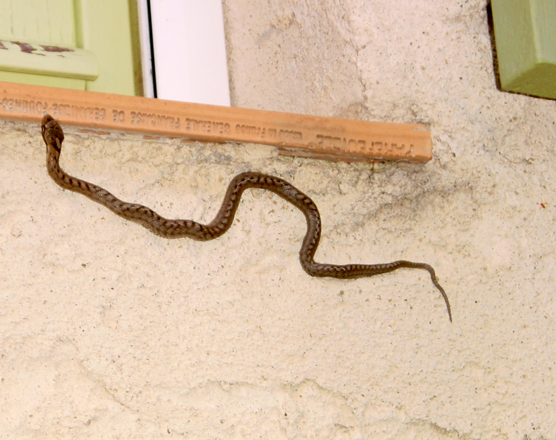 Petite couleuvre qui essaye de rentrer par une fenêtre